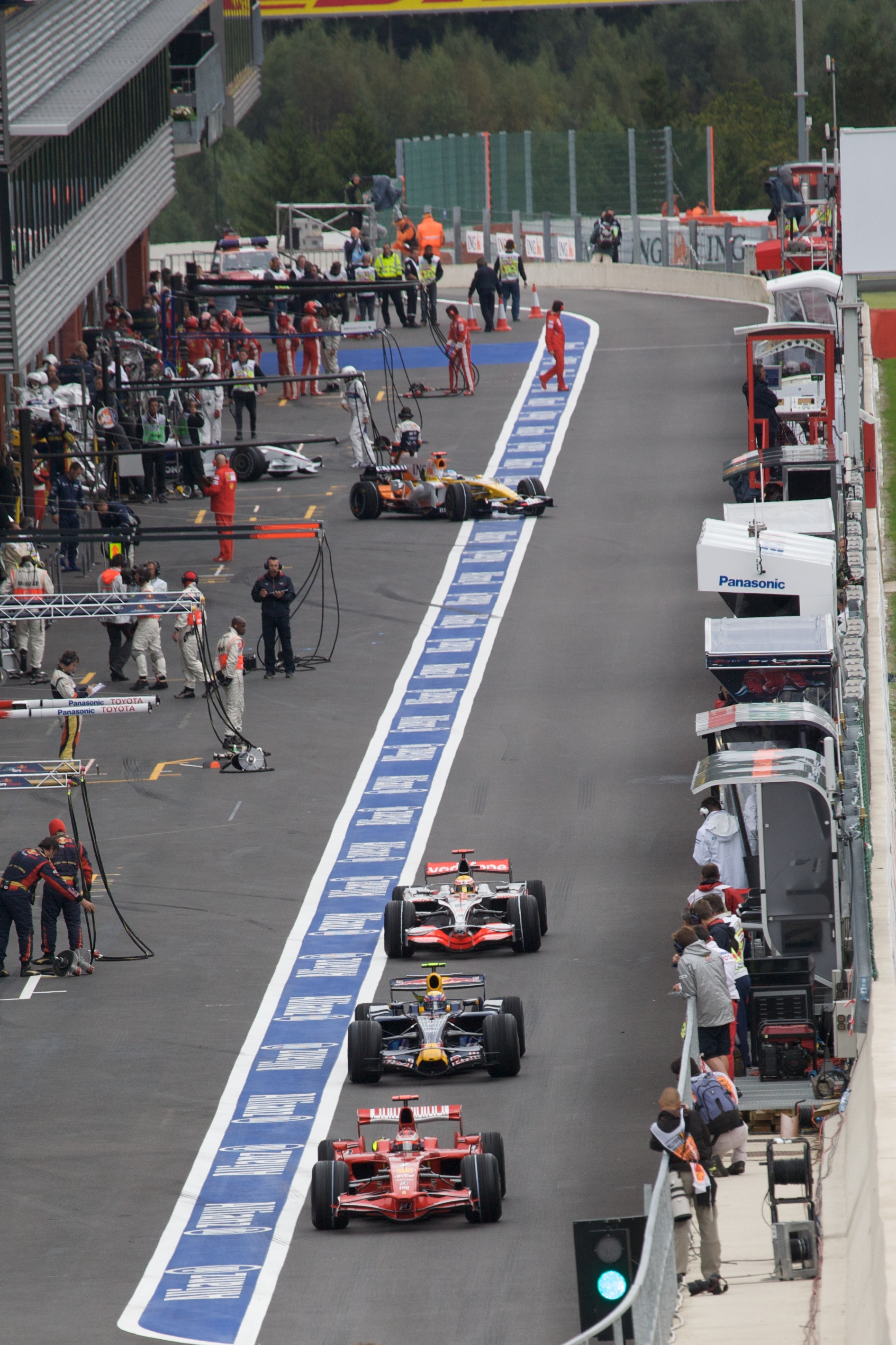 Spa 2008 Pit Race